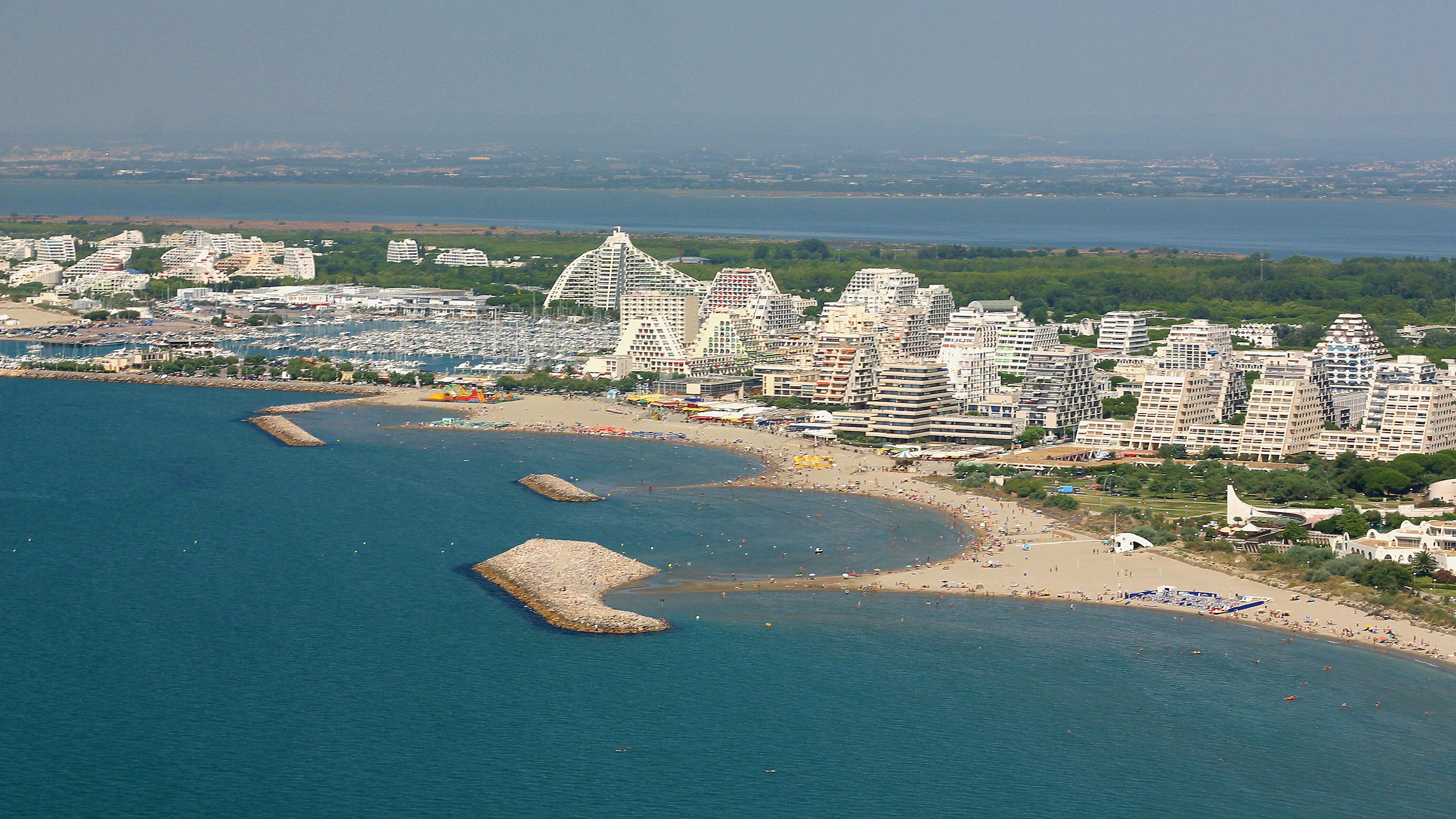 illustration aerienne de la ville architecturale de la grande motte